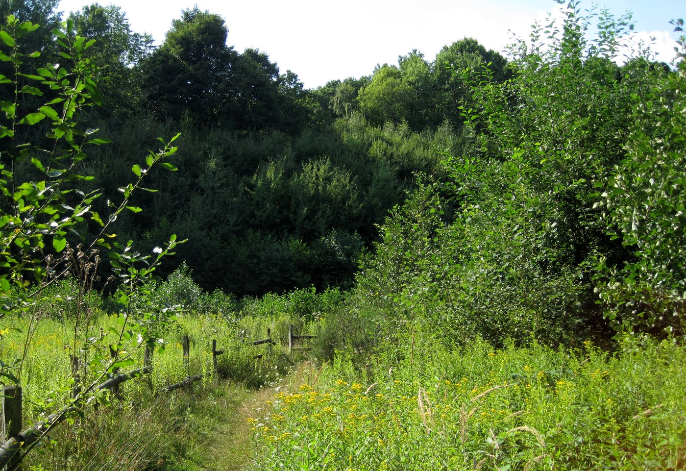 Naturschutzgebiet „Grube Oberauel“ (NSG GL-048) bei Bergisch Gladbach